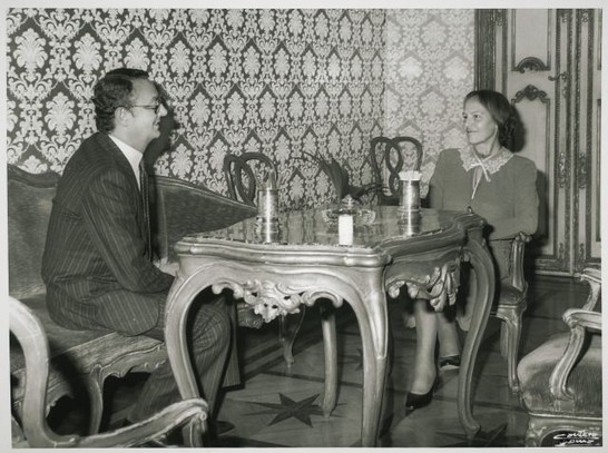 Il Presidente della Camera dei Deputati Nilde Iotti riceve Franco Colombo direttore del TG1